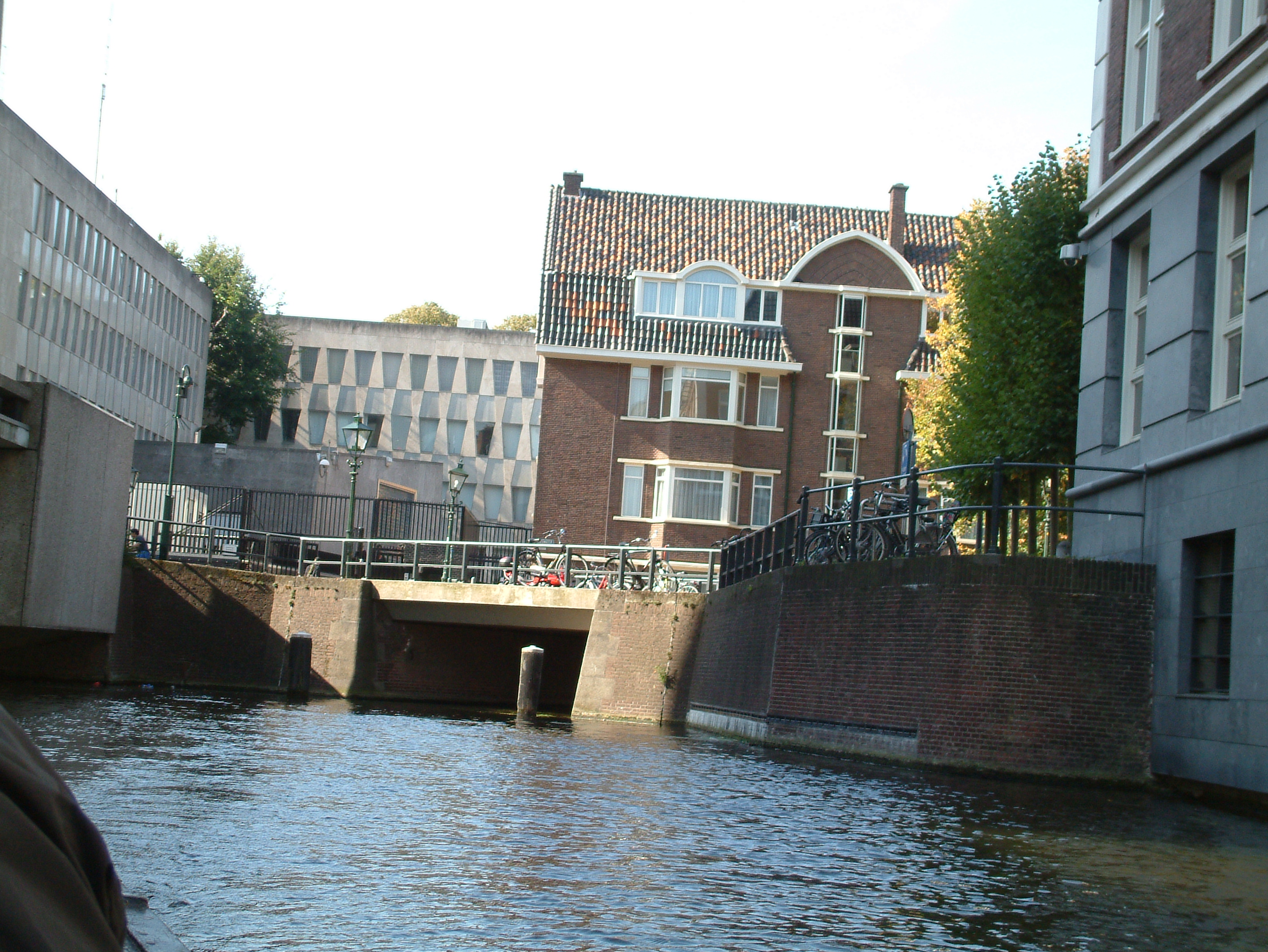 Brug in Den Haag